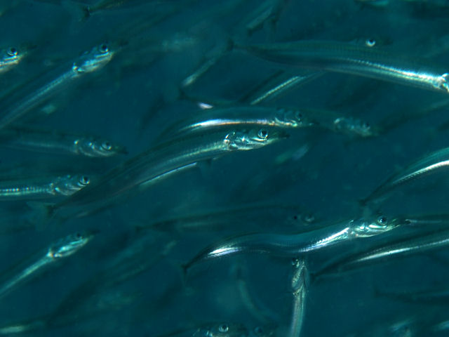 イカナゴ Ammodytes personatus